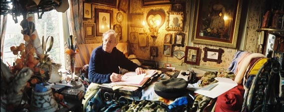 Henri Pollès dans sa chambre de sa maison de Brunoy